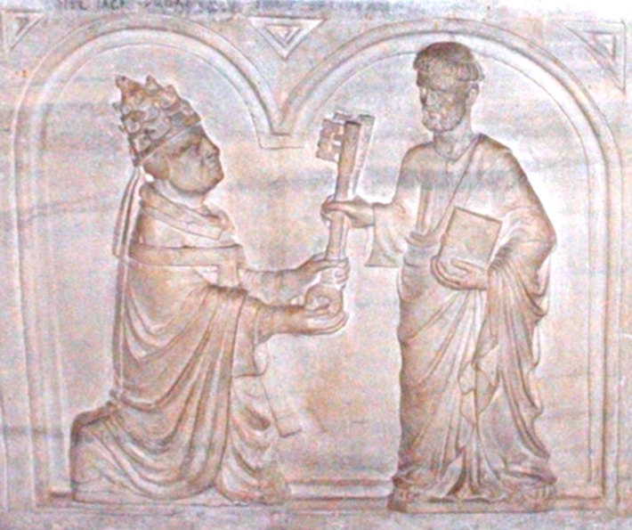 Tomb of pope Urbanus VI, "grotte vaticane", Basilica di San Pietro